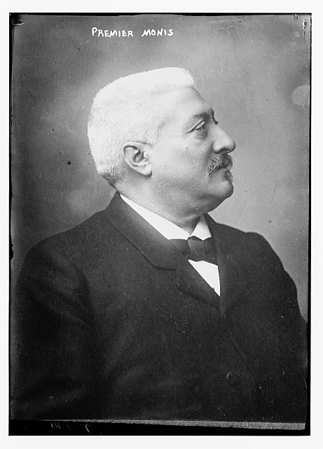 French Prime Minister Ernest Monis (1846 - 1929)